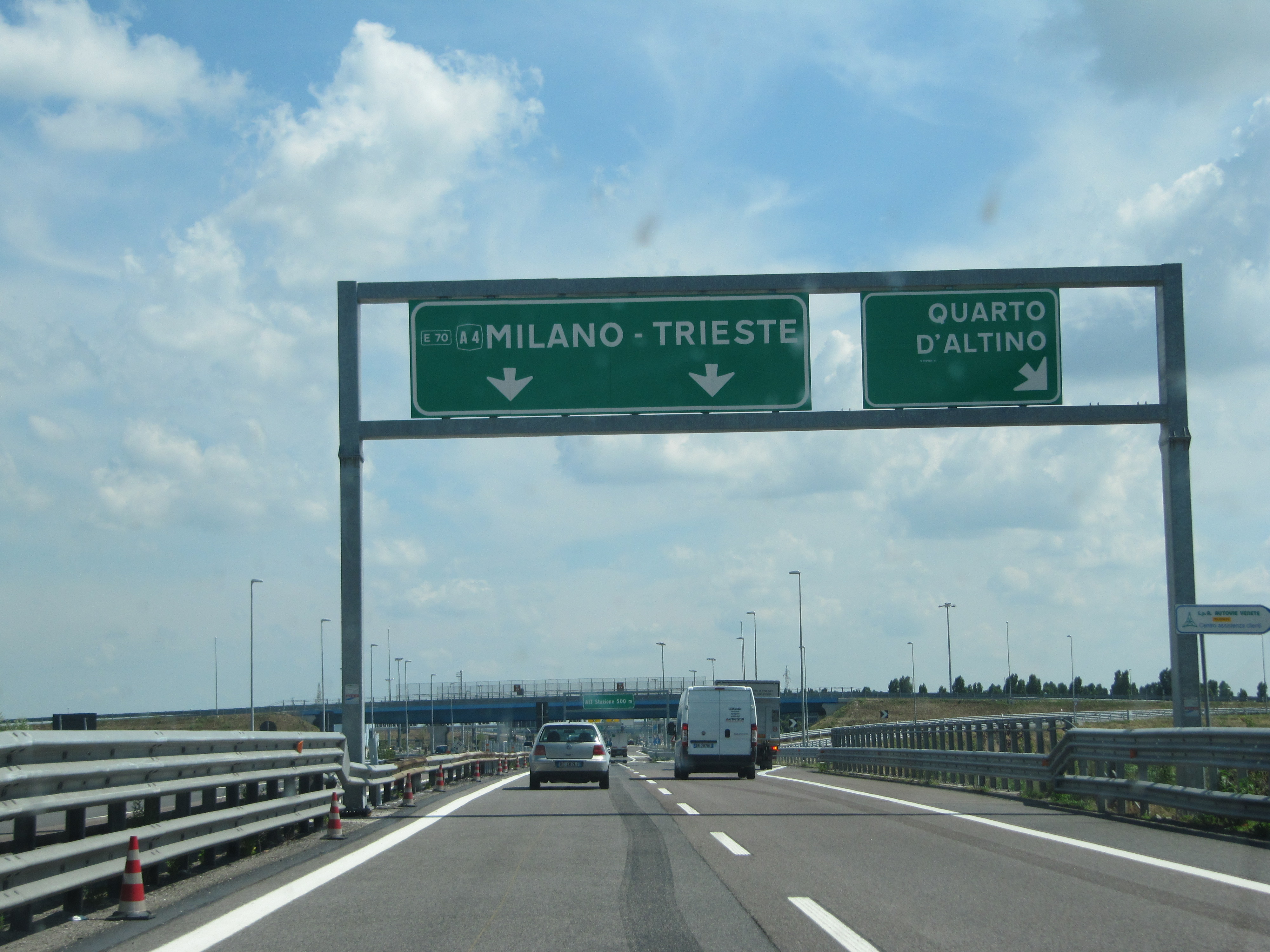 A57 Italia